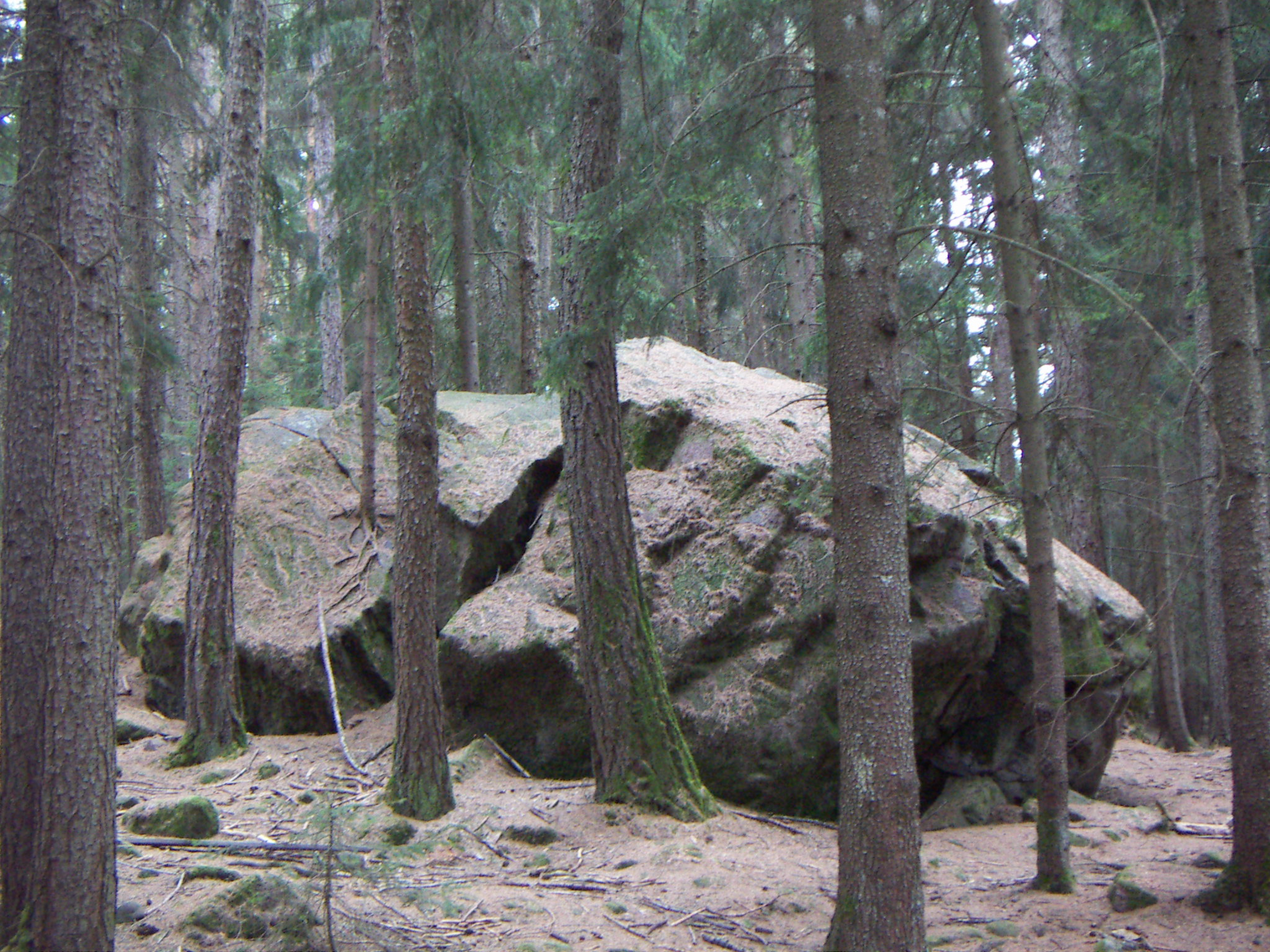 Sasso delle streghe, Fiè, Alto Adige, Italia.